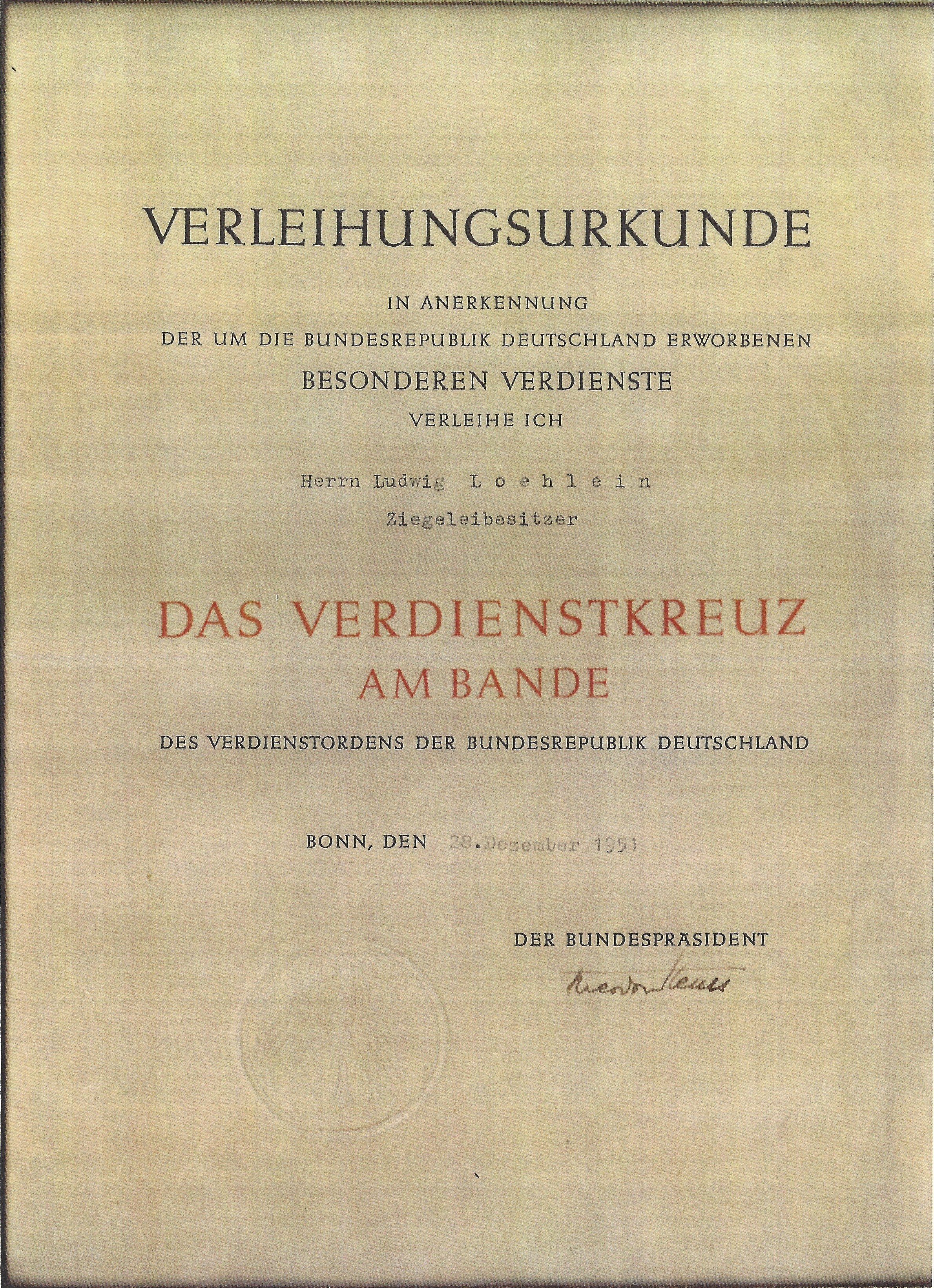 Kopie der Verleihungsurkunde für Ludwig Löhlein